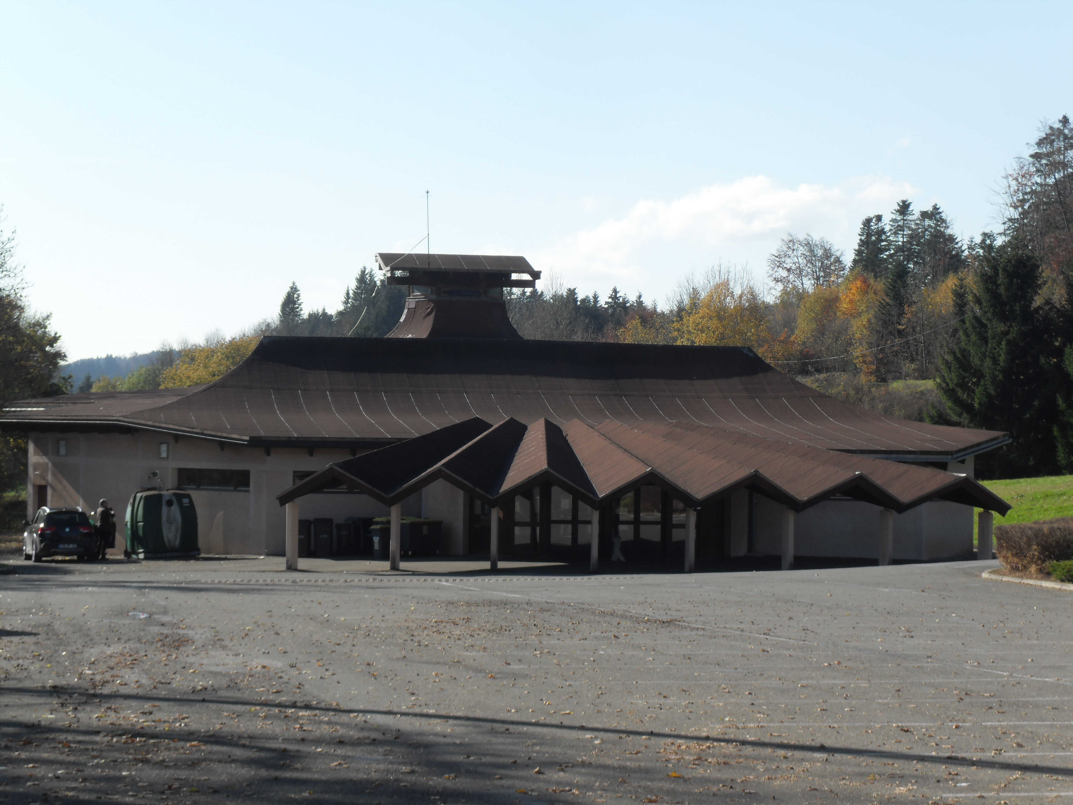 La salle des fêtes de Maîche, ville du Doubs, en France.